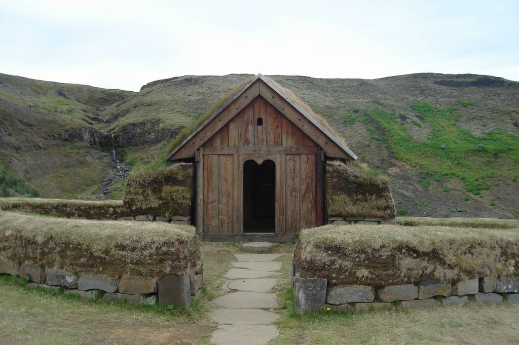 Der Eingang in die Kirche des rekonstruierten Hofes "Stöng" in Þjórsádal.